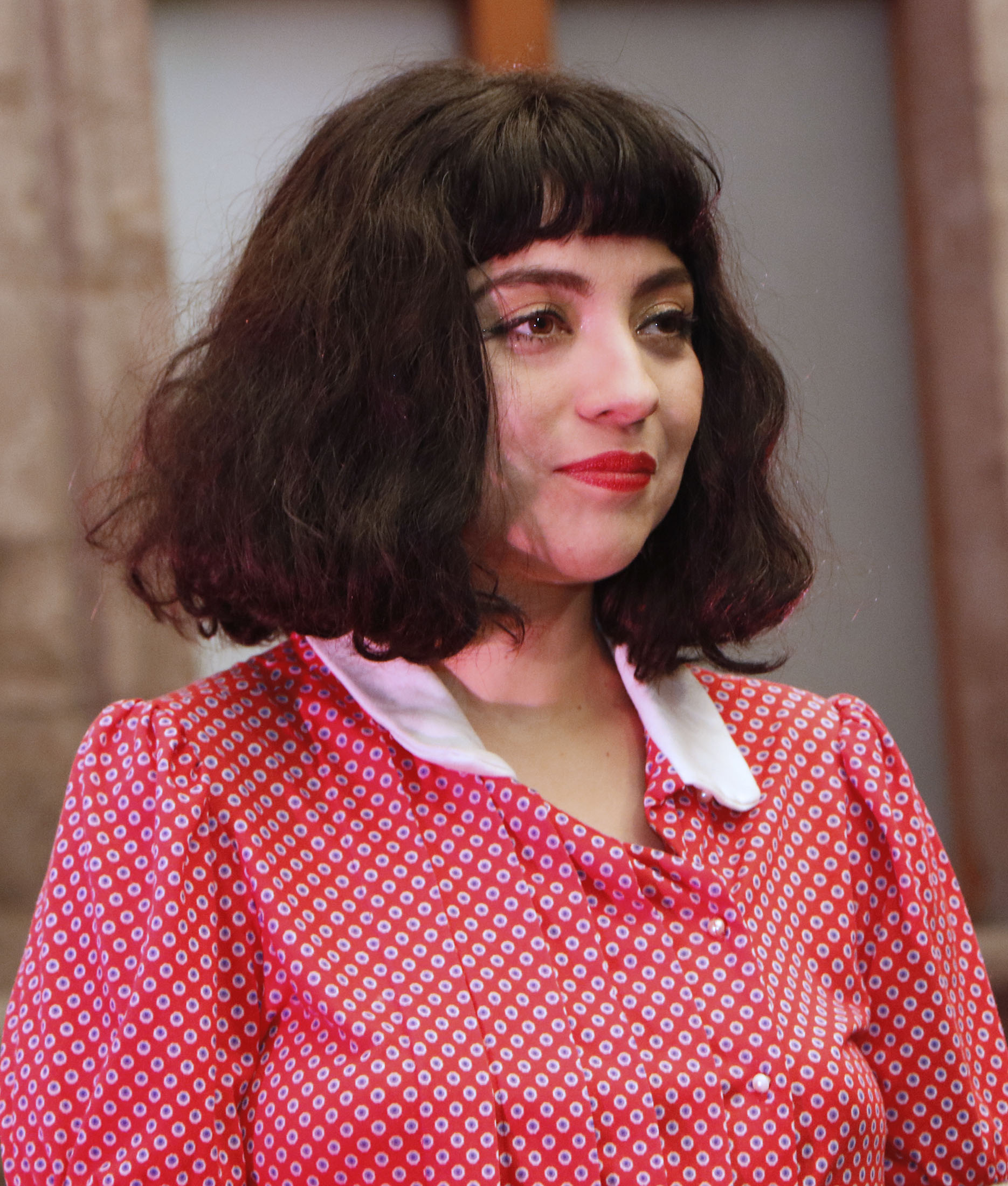 Miércoles 11 de marzo de 2020 Como parte de la segunda edición de Tiempo de Mujeres. Festival por la igualdad, en el Museo de la Ciudad de México, Mon Laferte realizó un recorrido de medios y posteriormente inauguró su exposición temporal llamada Gestos, misma que estará abierta al público del jueves 12 de marzo al domingo 12 de abril. Fotografía: Tania Victoria/ Secretaría de Cultura de la Ciudad de México